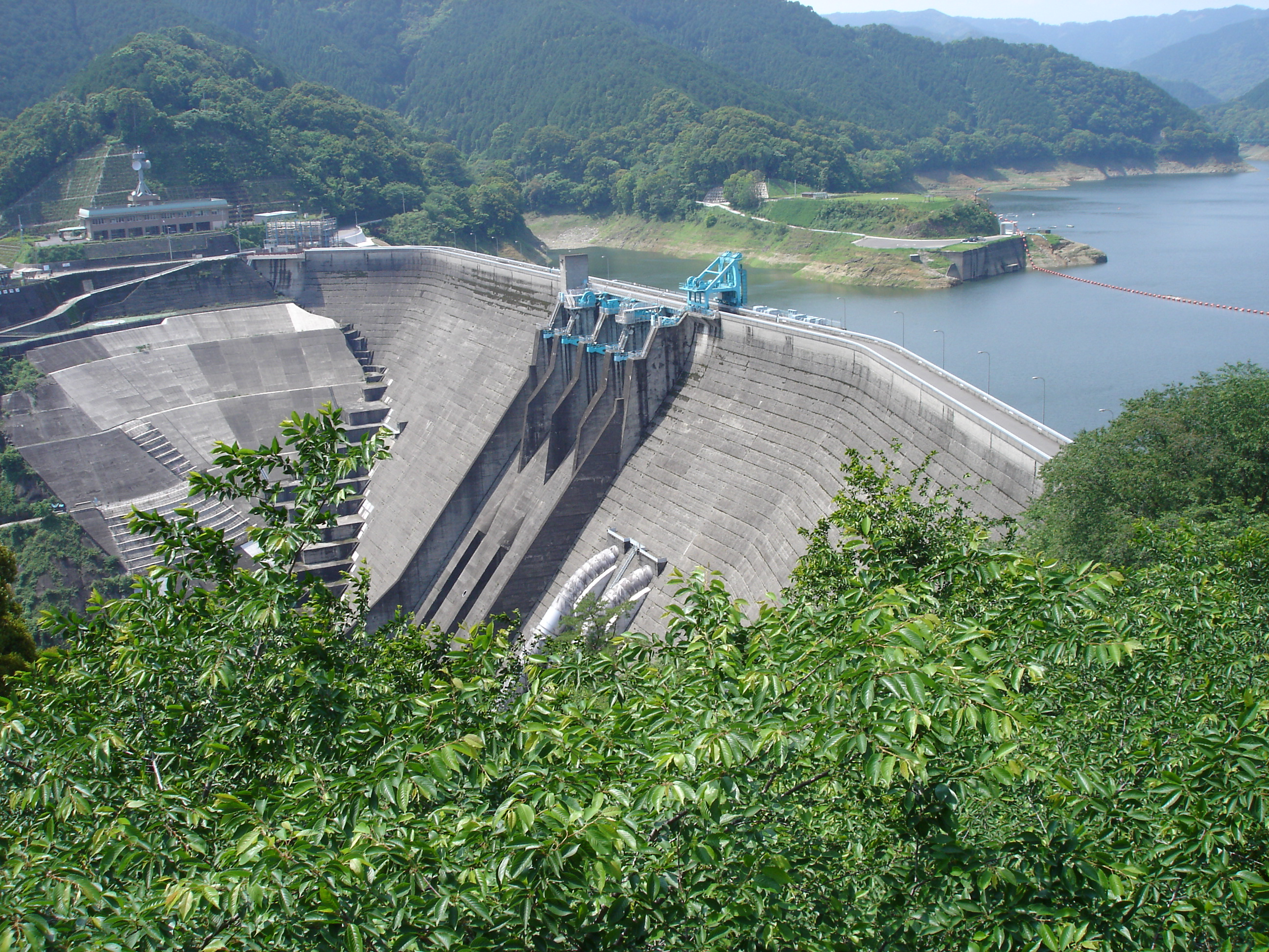 鶴田ダムをダム併設公園より